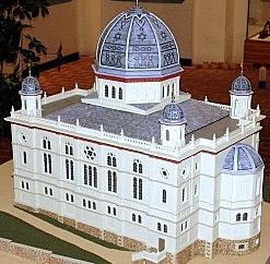 Synagoga w Teplice